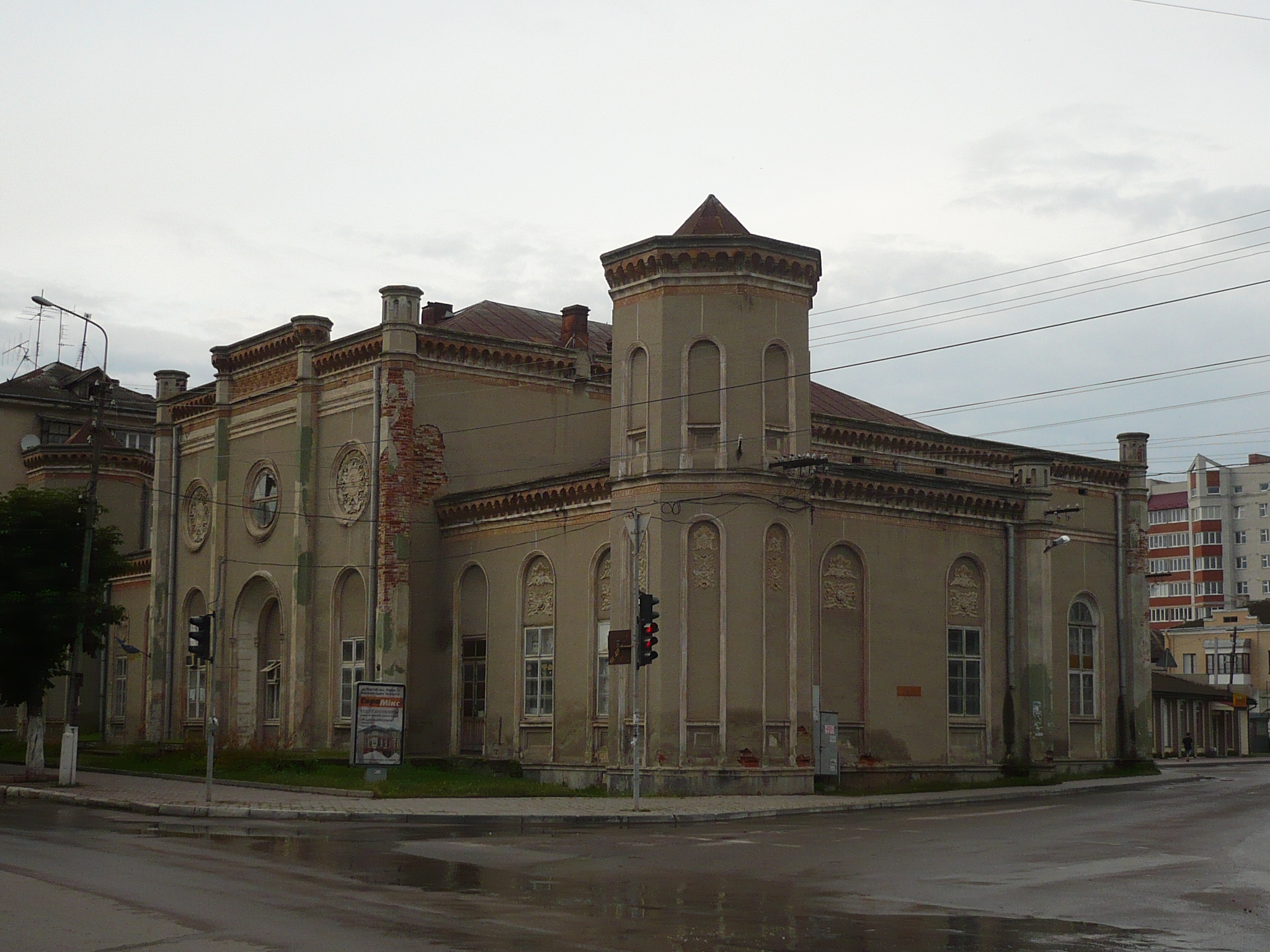 Czortków. Synagoga